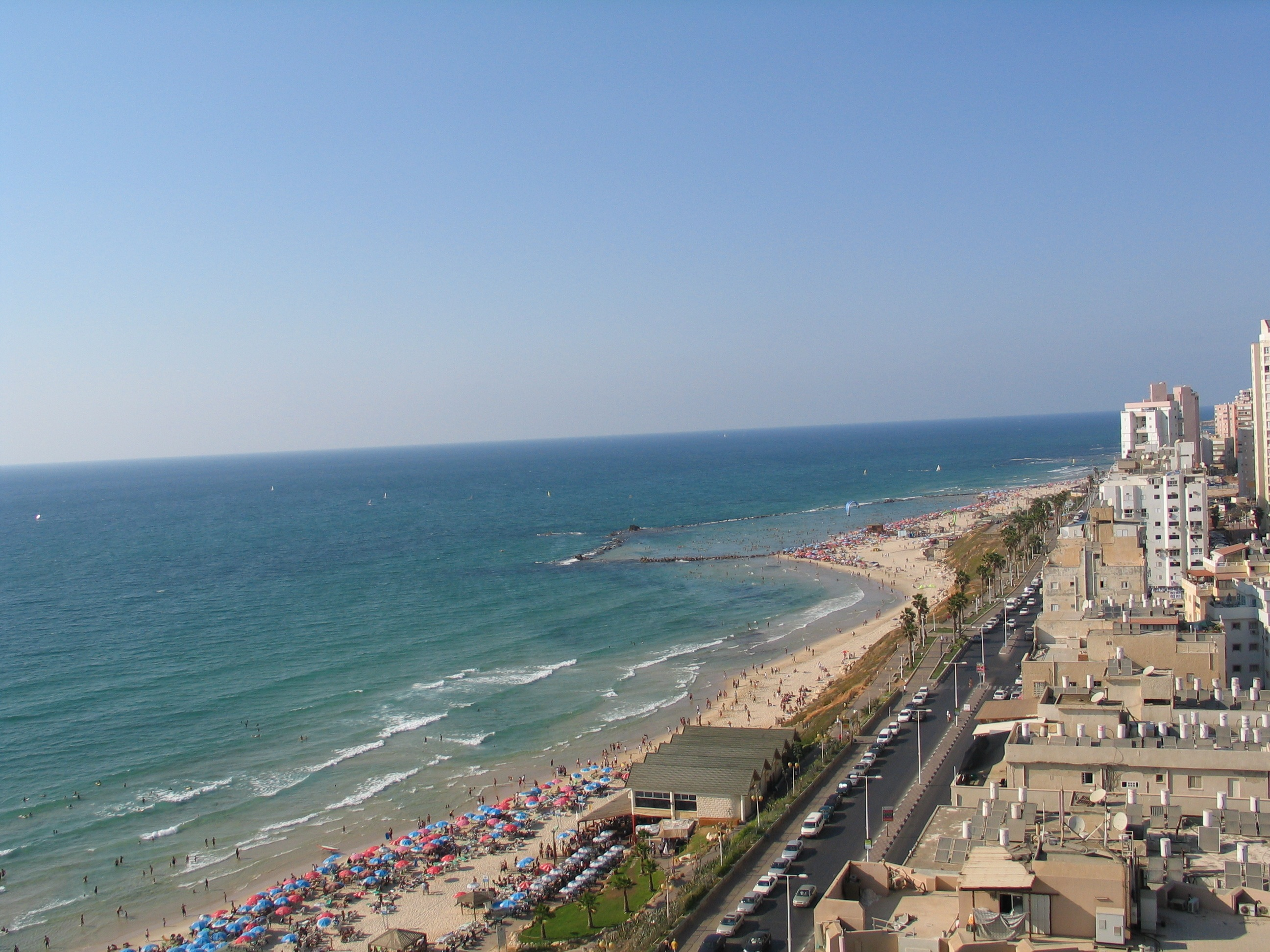 Bat Yam beach